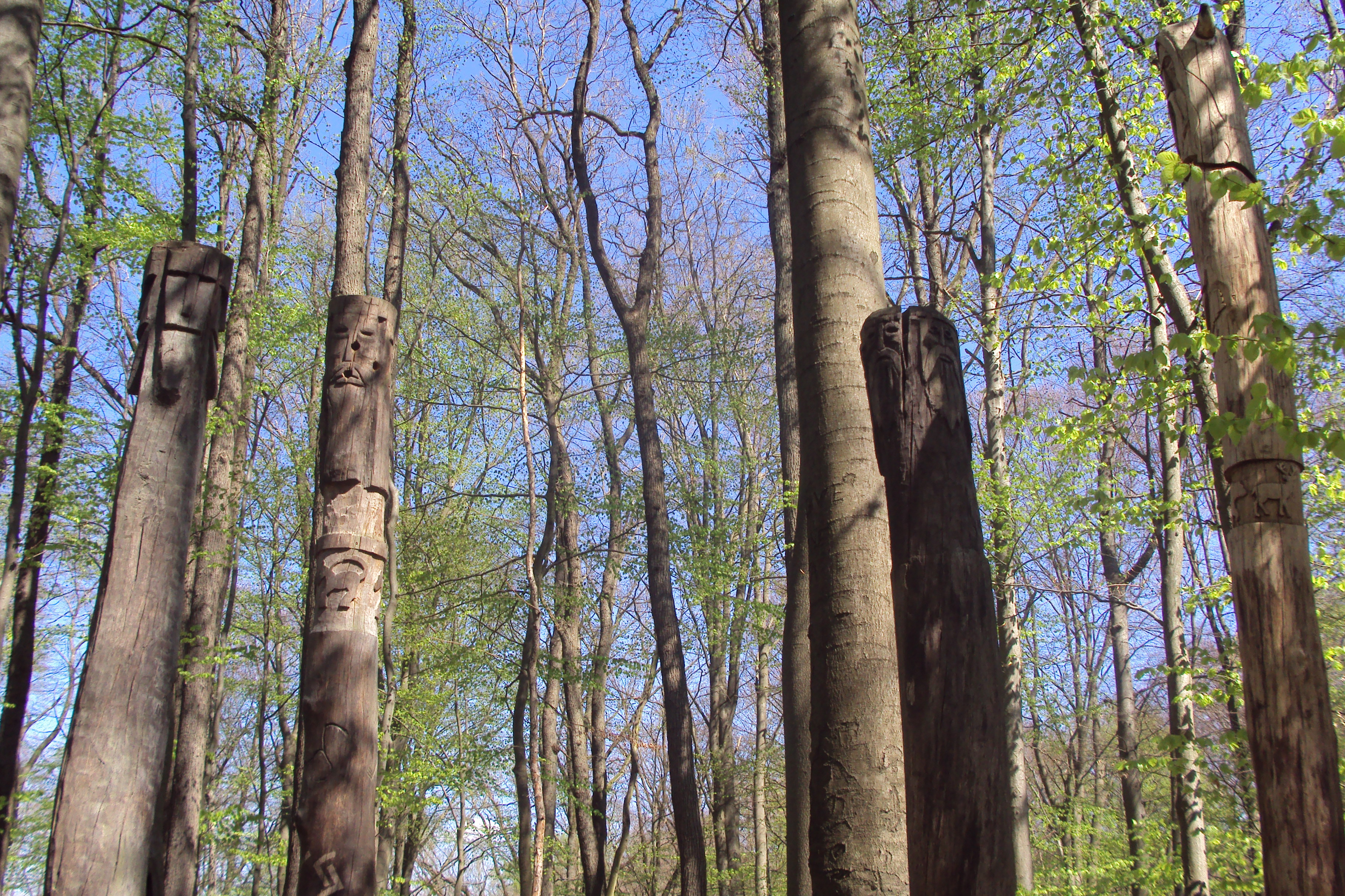 Miejsce kultu w Puszczy Bukowej